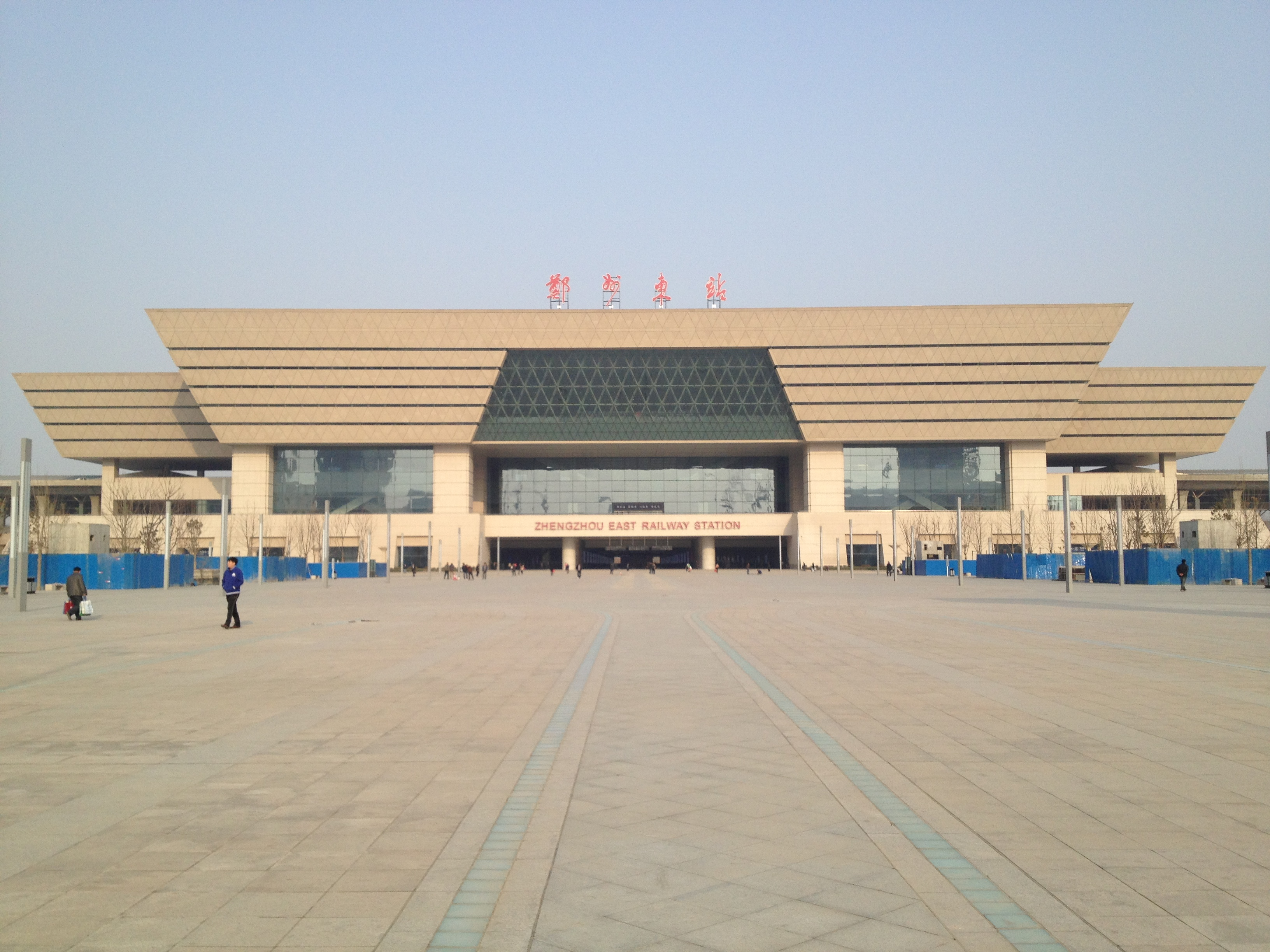 郑州东站（建设中）